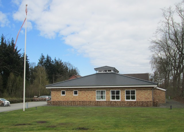 Det Danske Hus i Sporskifte (Weiche), Flensborg